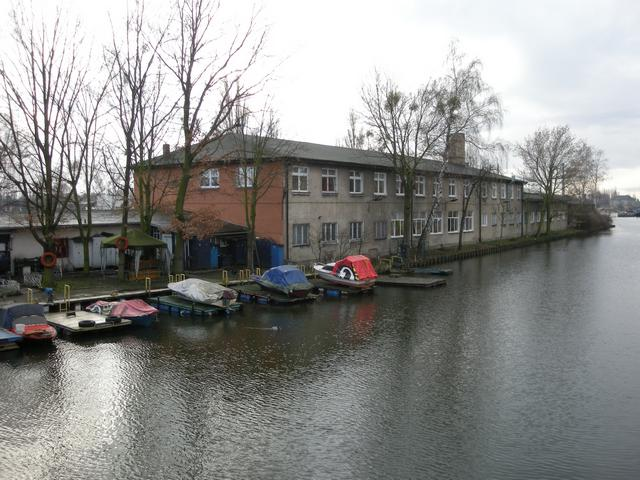 Budynek Zasadniczej Szkoły Zawodowej nr 16 im. Jana Pawła II oraz Szkoły Przysposabiającej do Pracy nr 3 w Szczecinie przy ul. Kolumba 88A na Wyspie Jaskółczej; widok od strony kanału Odry Zachodniej